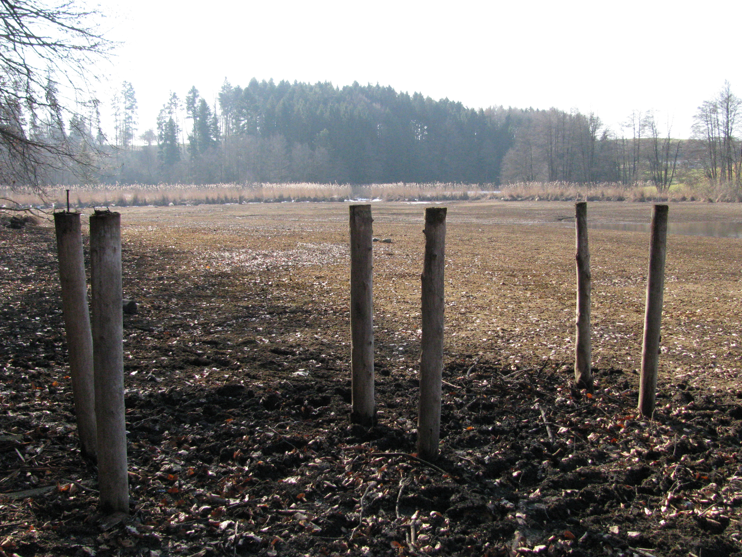 Deutschland - Baden-Württemberg - Bodenseekreis - Neukirch: abgelassener Jägerweiher